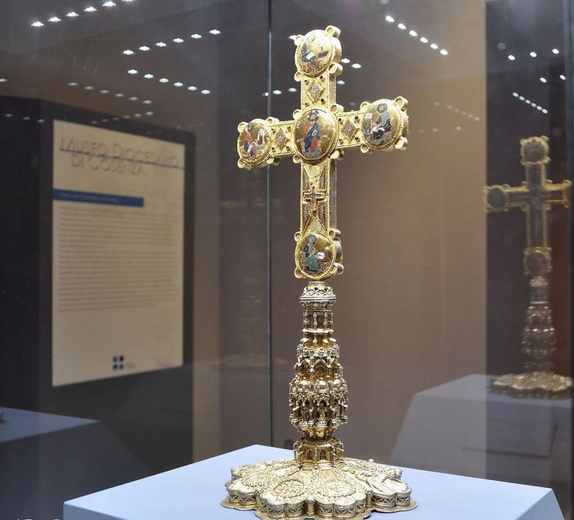 Stauroteca donata da Federico II di Svevia nel 1222 nel museo diocesano di Cosenza